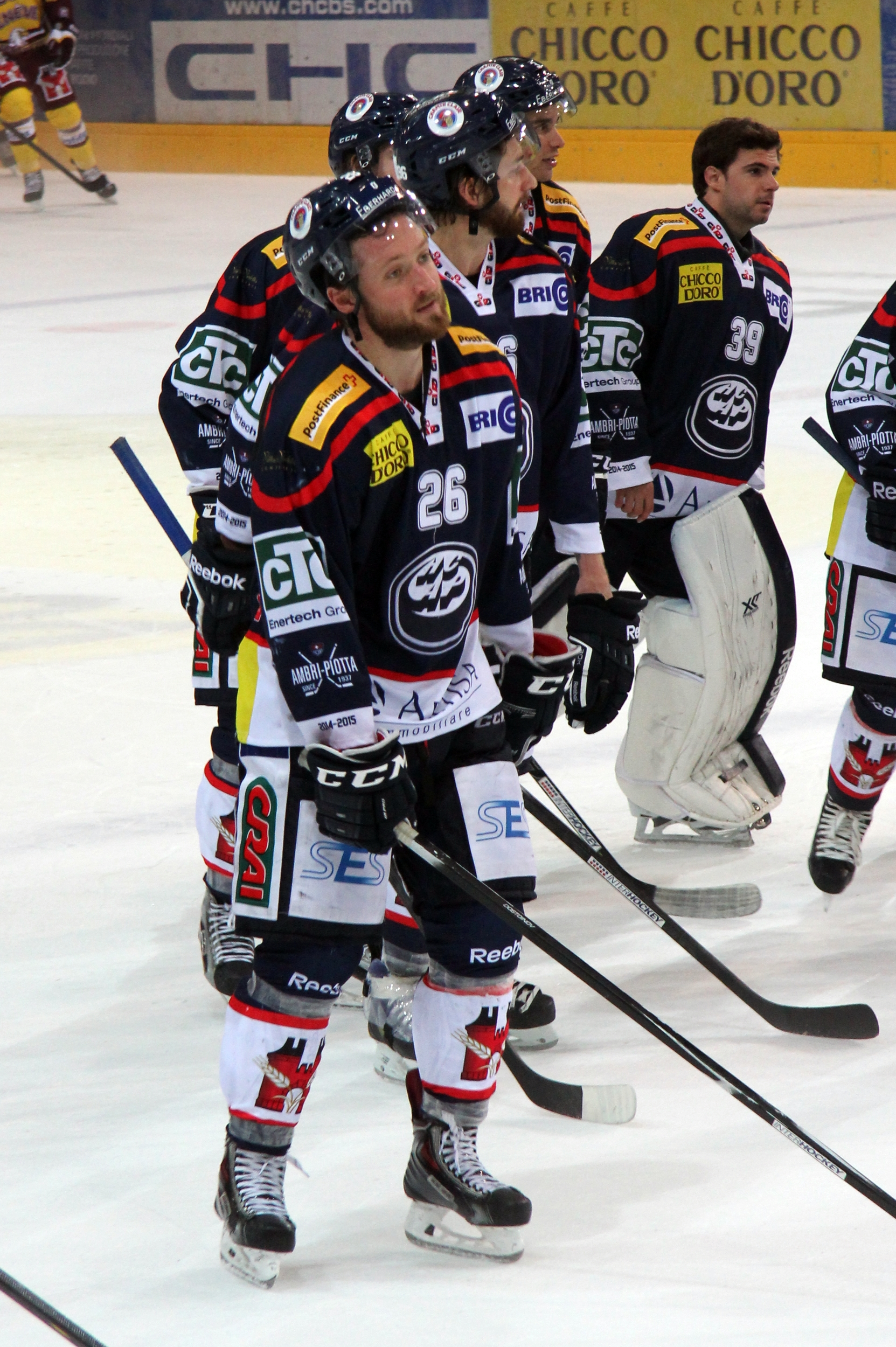 Alekseï Dostoïnov (A 26), Sandro Zurkirchen (A 39).